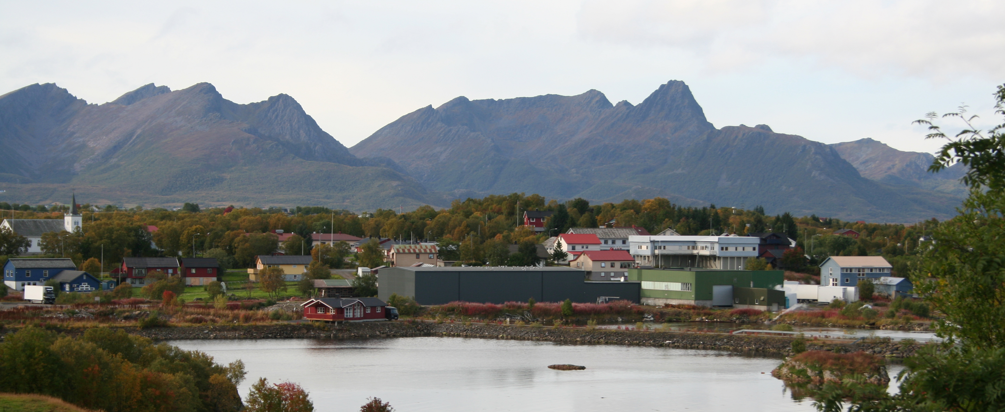 Alsvåg in Øksnes, Norway